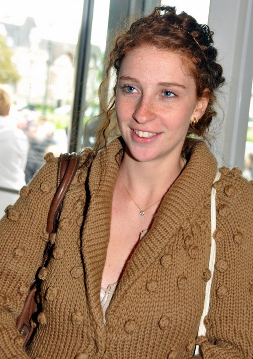 Lola Naymark au festival du film de Cabourg